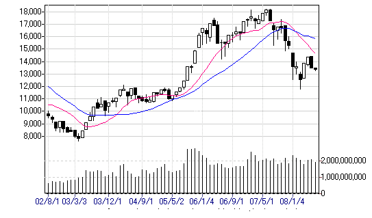 日経平均チャート